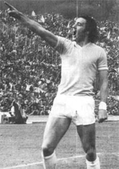 Giorgio Chinaglia con la maglia biancoceleste in una foto scattata negli anni settanta. Licensing Categoria:Immagini di Giorgio Chinaglia